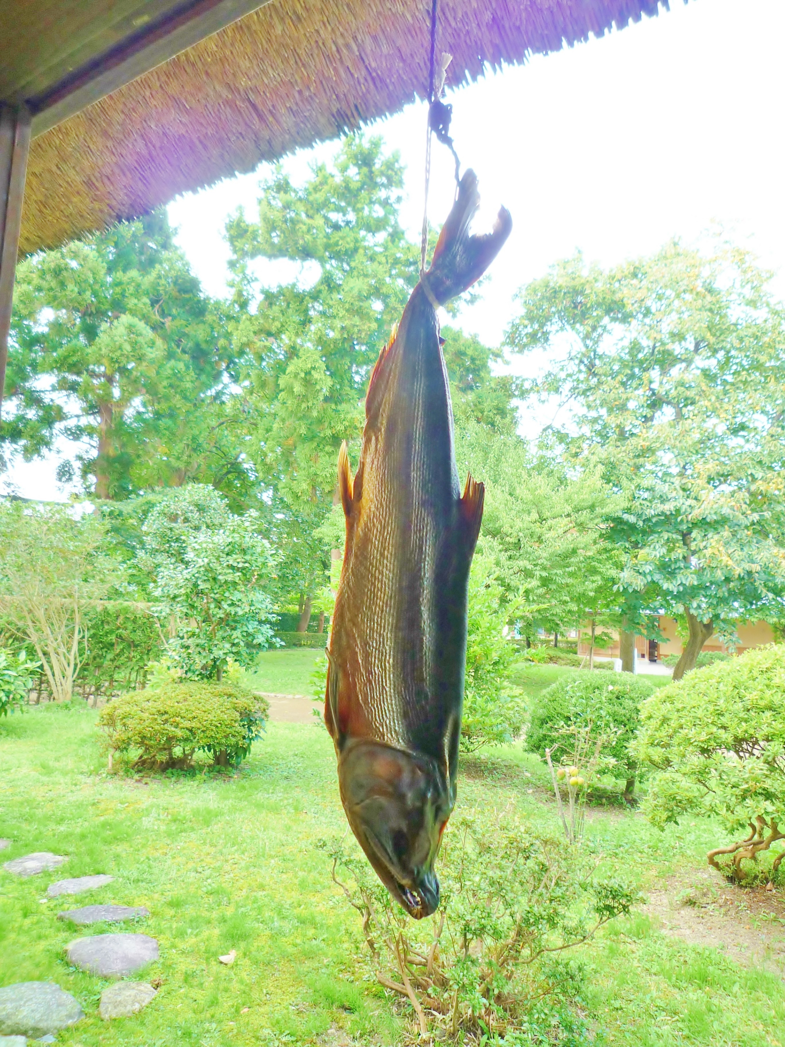 Murakami-city,Niigata,Japan